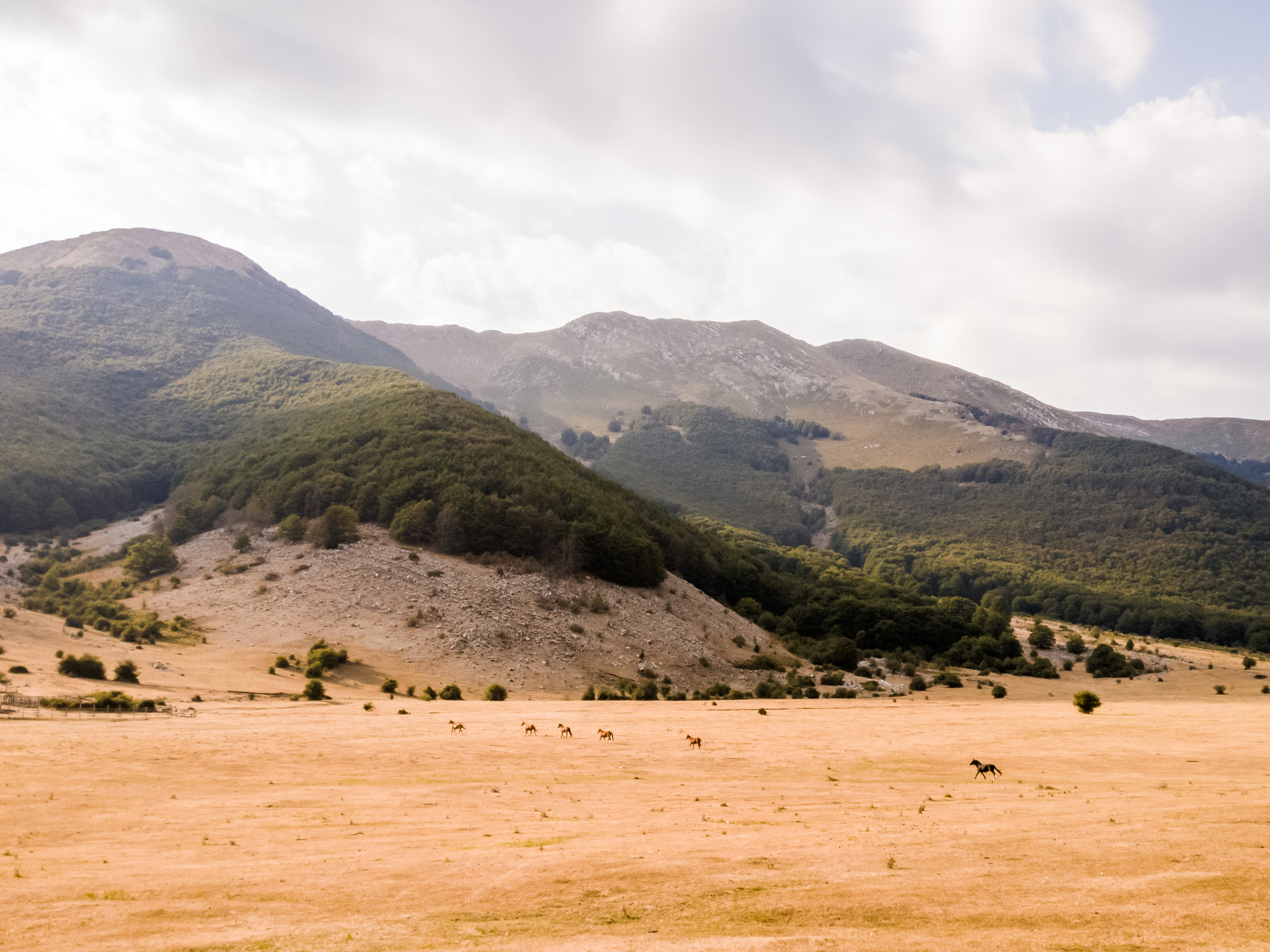 500px provided description: Prato di Campoli [#nature ,#europe ,#italy ,#grass ,#animal ,#mountain ,#valley ,#italia ,#outdoors ,#frosinone ,#hillside ,#lazio ,#ciociaria ,#no person]